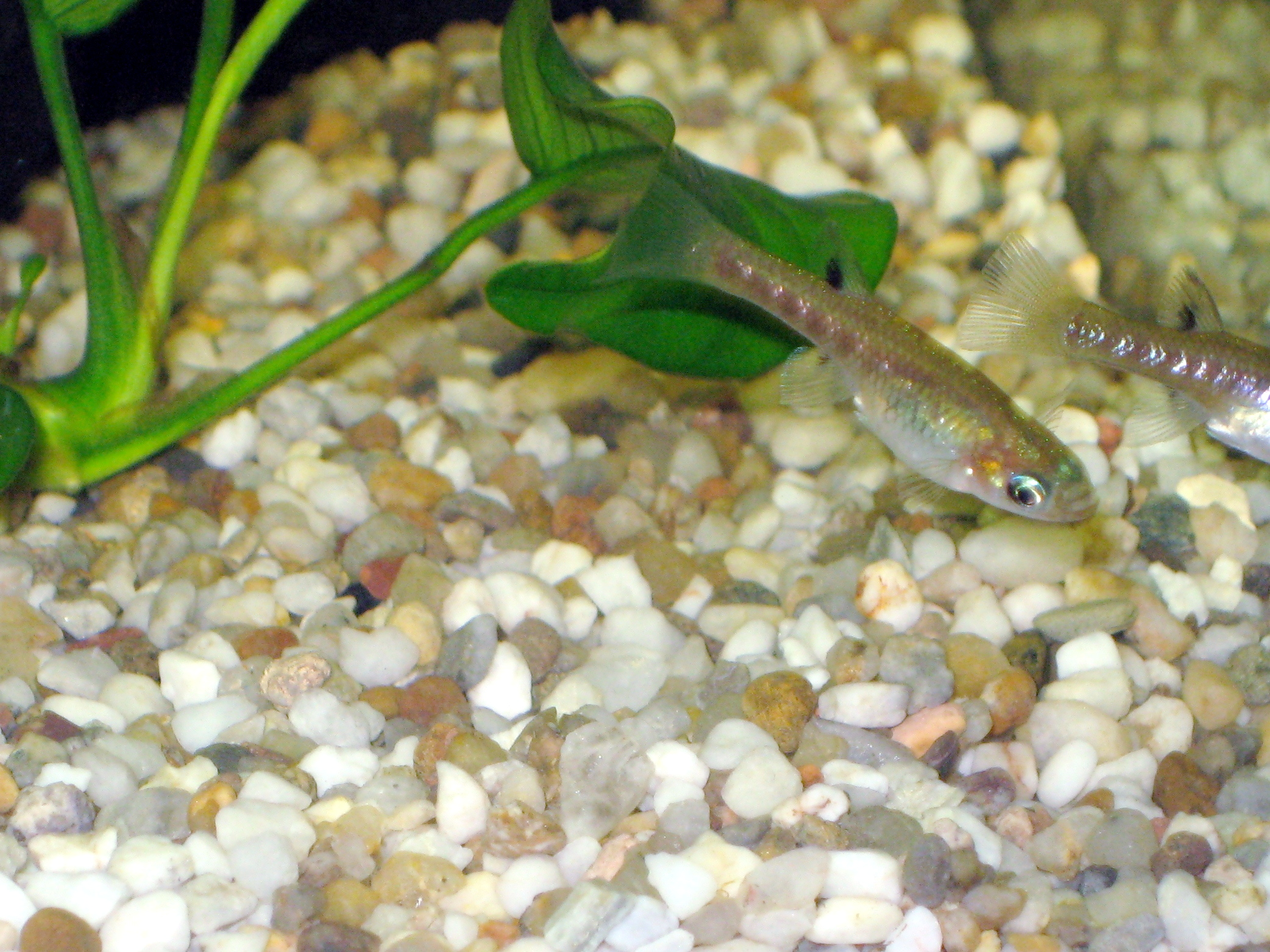 Weibchen des Metallkärpflings (Girardinus metallicus) im Aquarium, fotografiert am 02.10.2010 von Michael Göllnitz